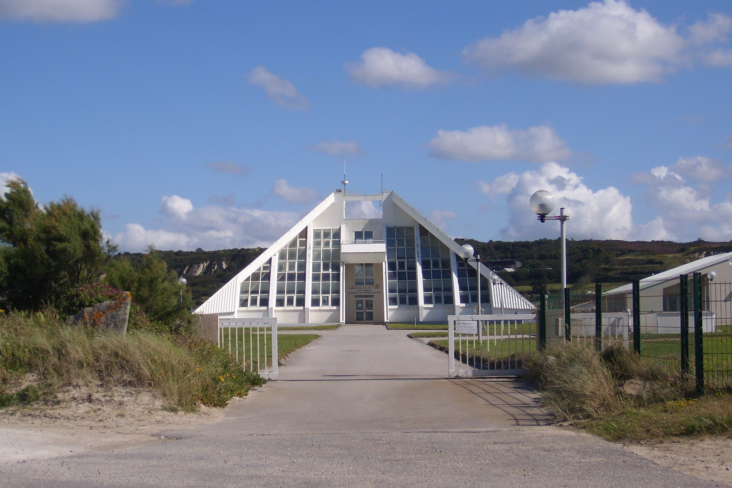 Intechmer, institut des techniques de la Mer, Tourlaville, Cherbourg, Manche, France